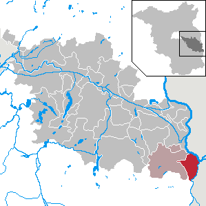 Neißemünde in Brandenburg (Country) - District Oder-Spree